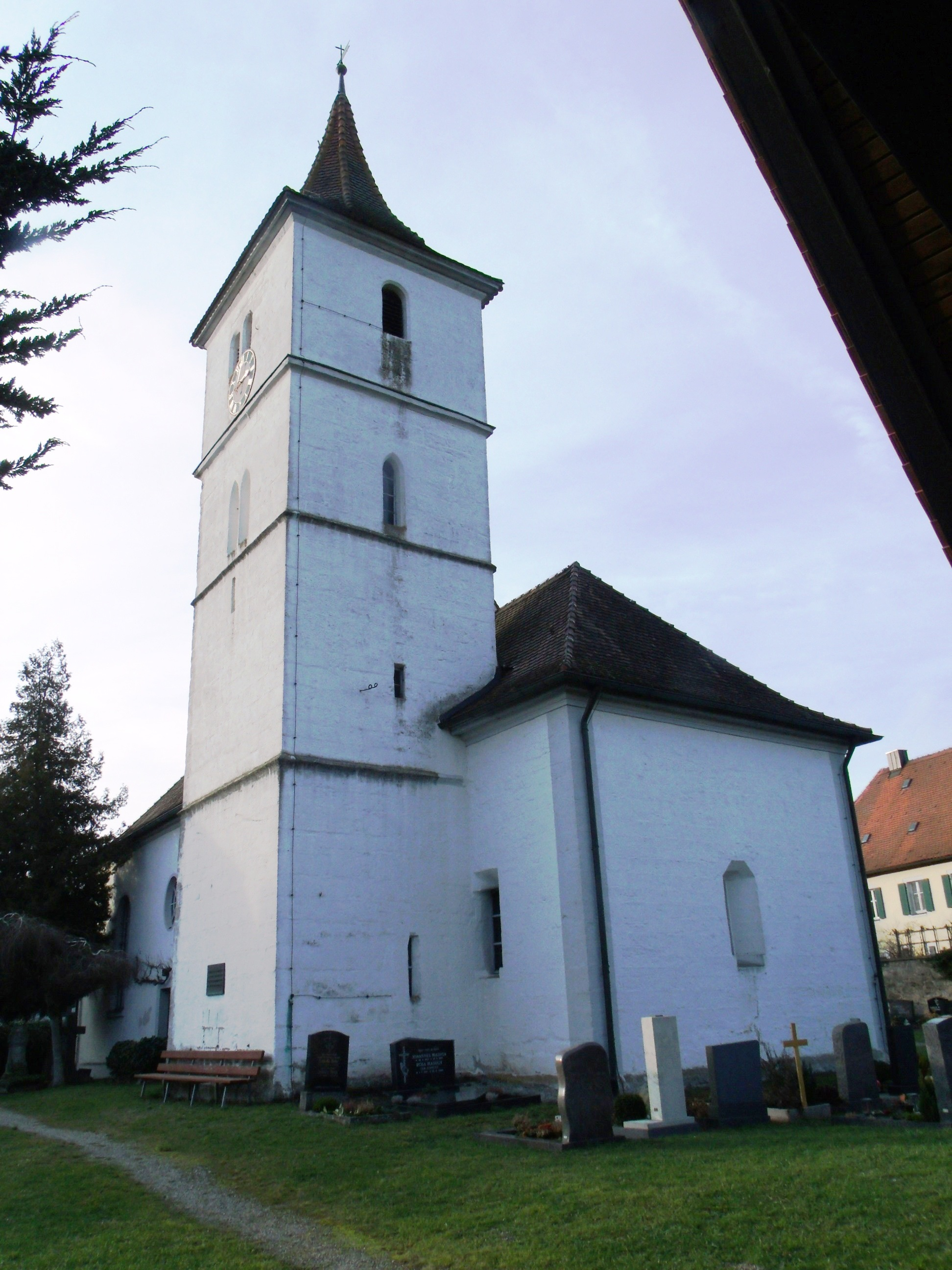 Neunkirchen, Ortsteil von Leutershausen im Landkreis Ansbach, St. Georgskirche